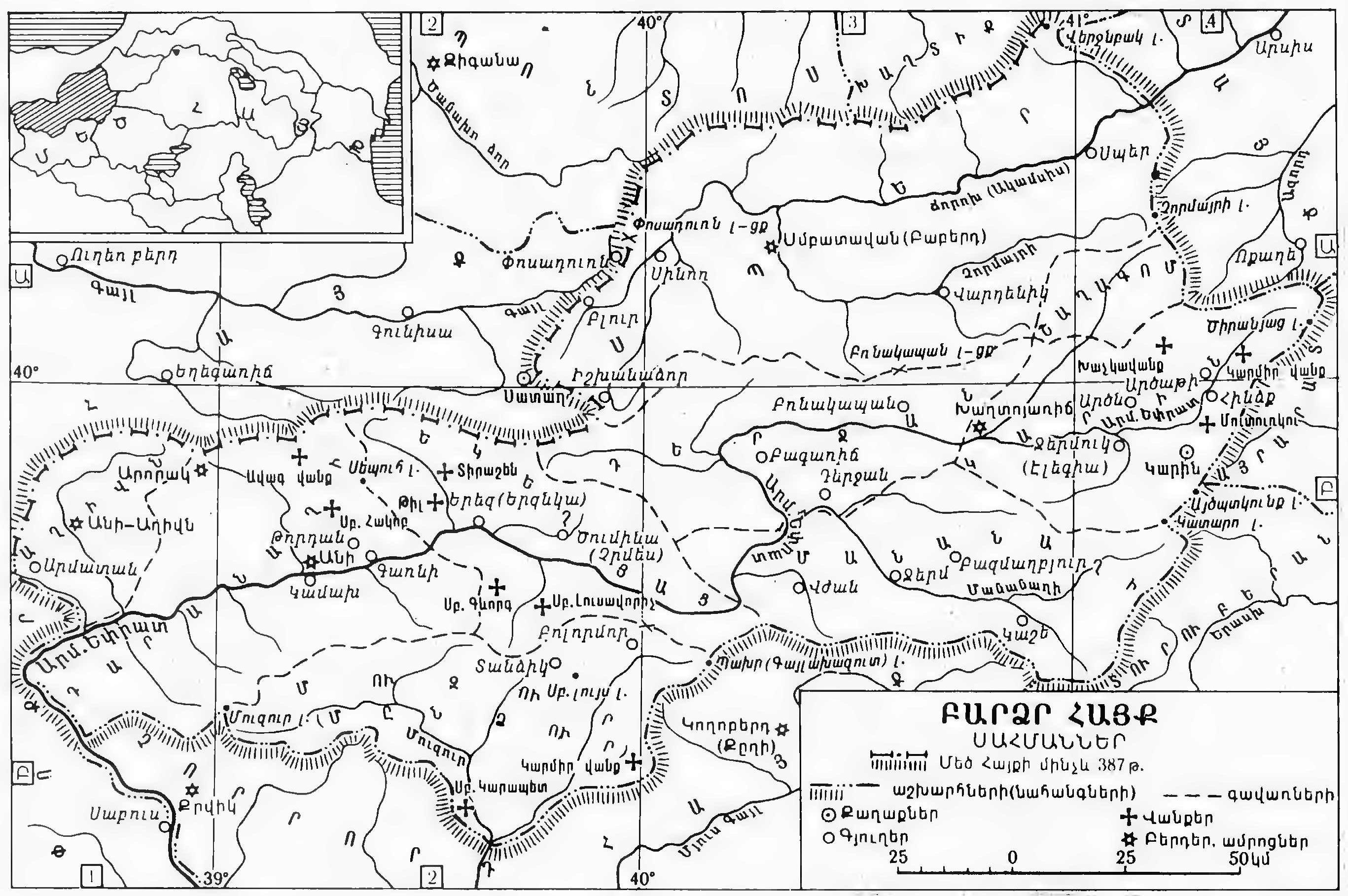 Մեծ Հայքի Բարձր Հայք գավառի քարտեզը